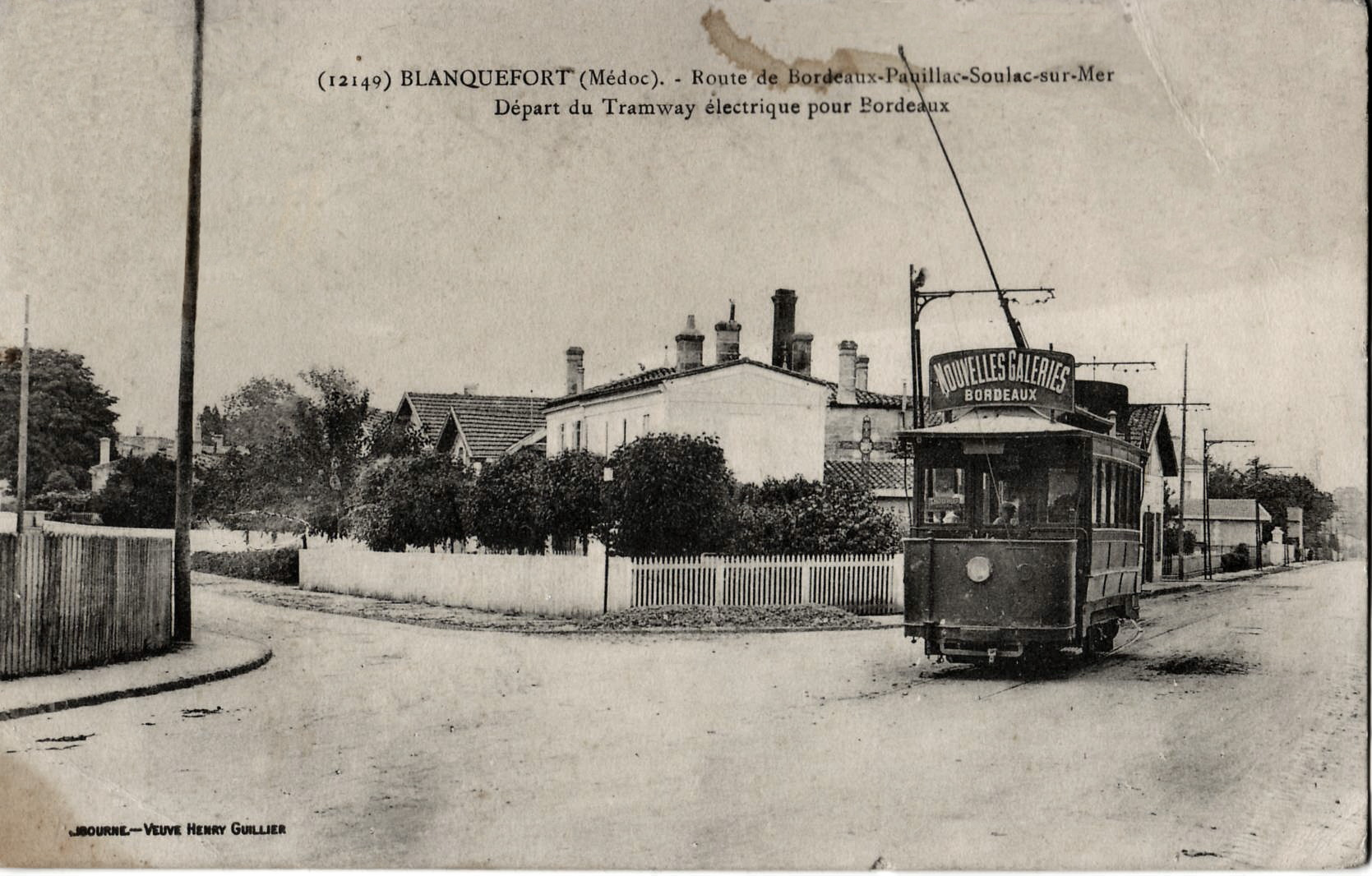 Carte postale ancienne éditée par Veuve Henri Guillier à Libourne n°12149 :BLANQUEFORT - Route de Bordeaux - Pauillac - Soulac-sur-Mer. Départ du Tramway électrique pour Bordeaux